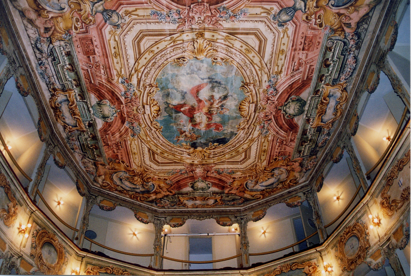 Vista dell'interno del Teatro Comunale di Penna San Giovanni (MC)- il soffitto ligneo